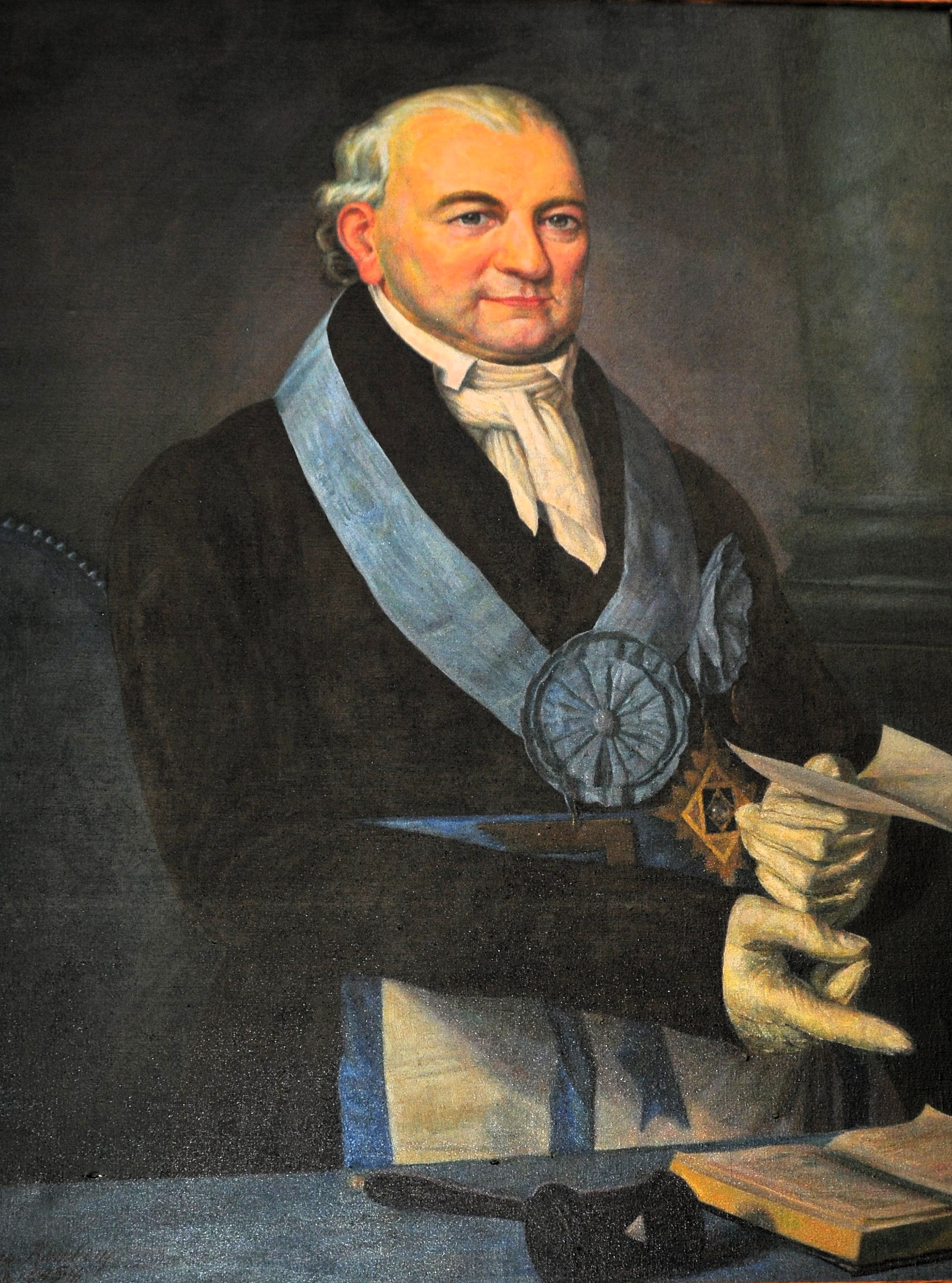 Ludwig Suhl (1753-1819) als Meister vom Stuhl der Loge Zur Weltkugel